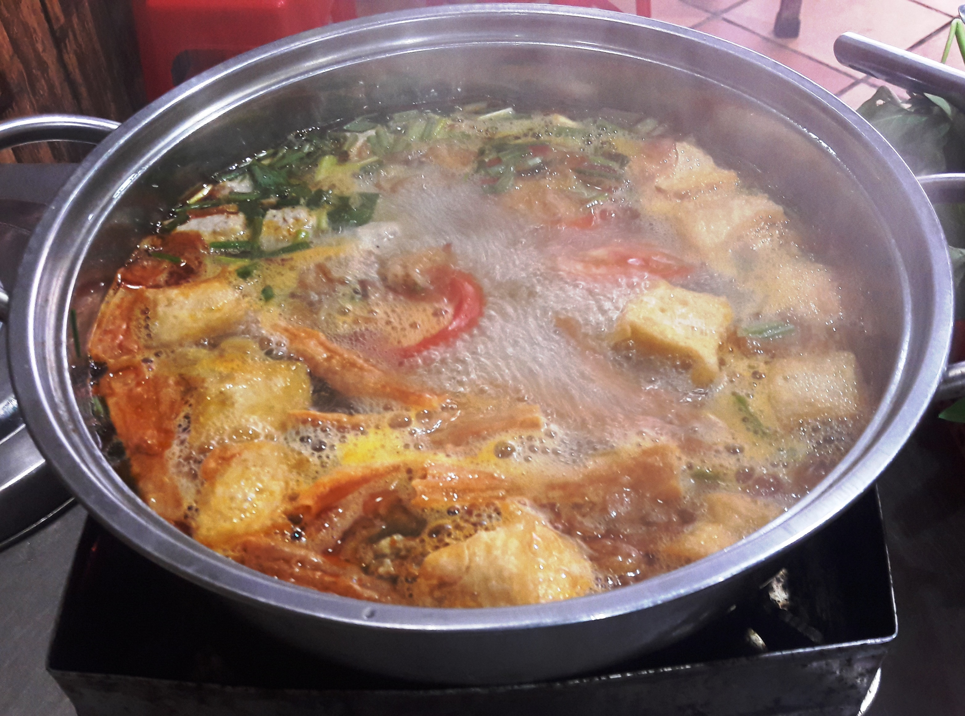 Cuisine of Vietnam